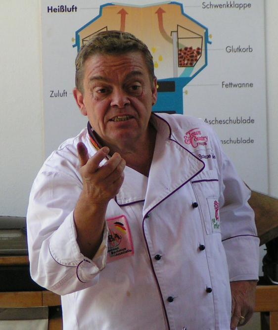 Hans-Joachim Fuchs, Grillweltmeister, bei einem seiner Grillkurse in der Grill- und Barbecue-Schule Erfurt/Deutschlands.